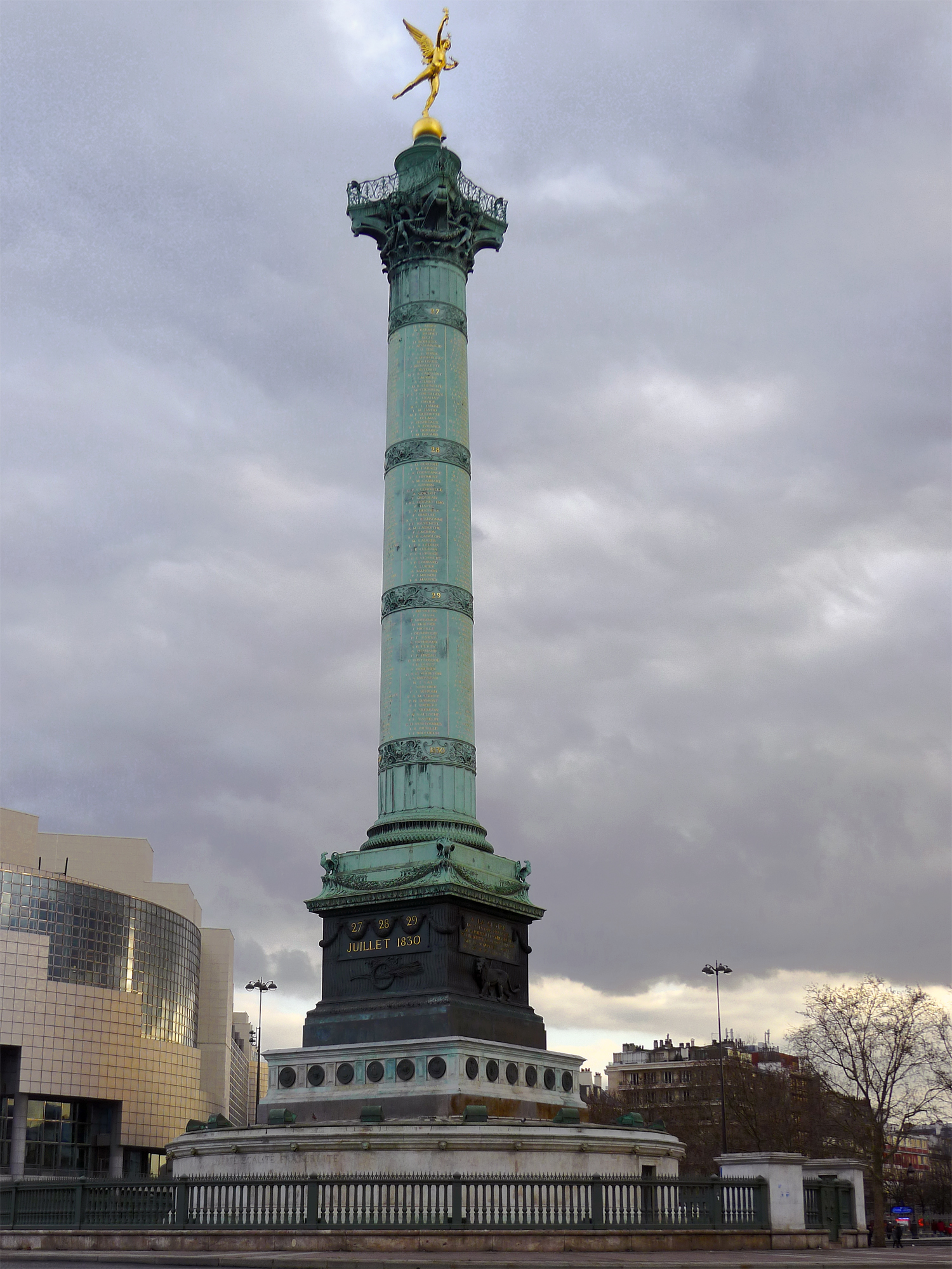 Colonne de Juillet, au centre de la place de la Bastille - Paris IV, XI et XII.